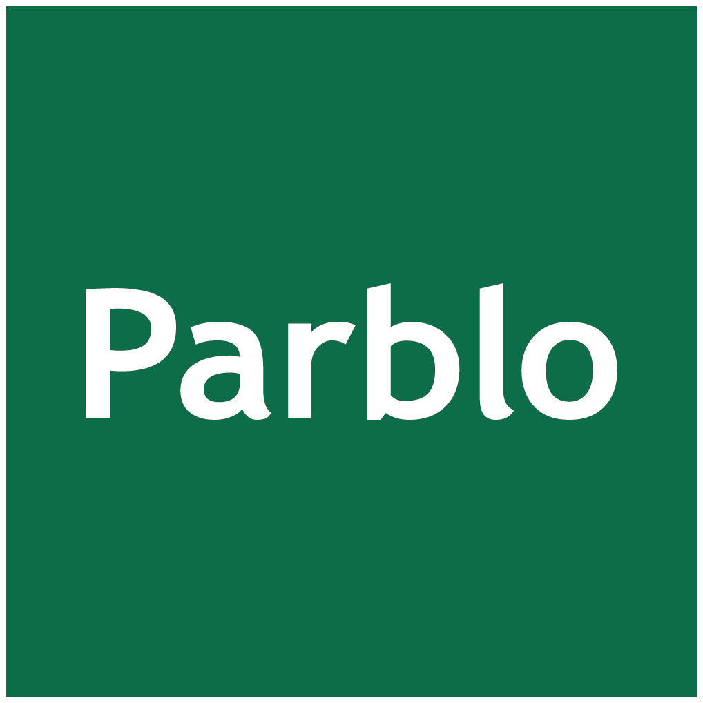 株式会社Parbloのロゴ